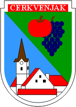 Wappen von Cerkvenjak Slowenien